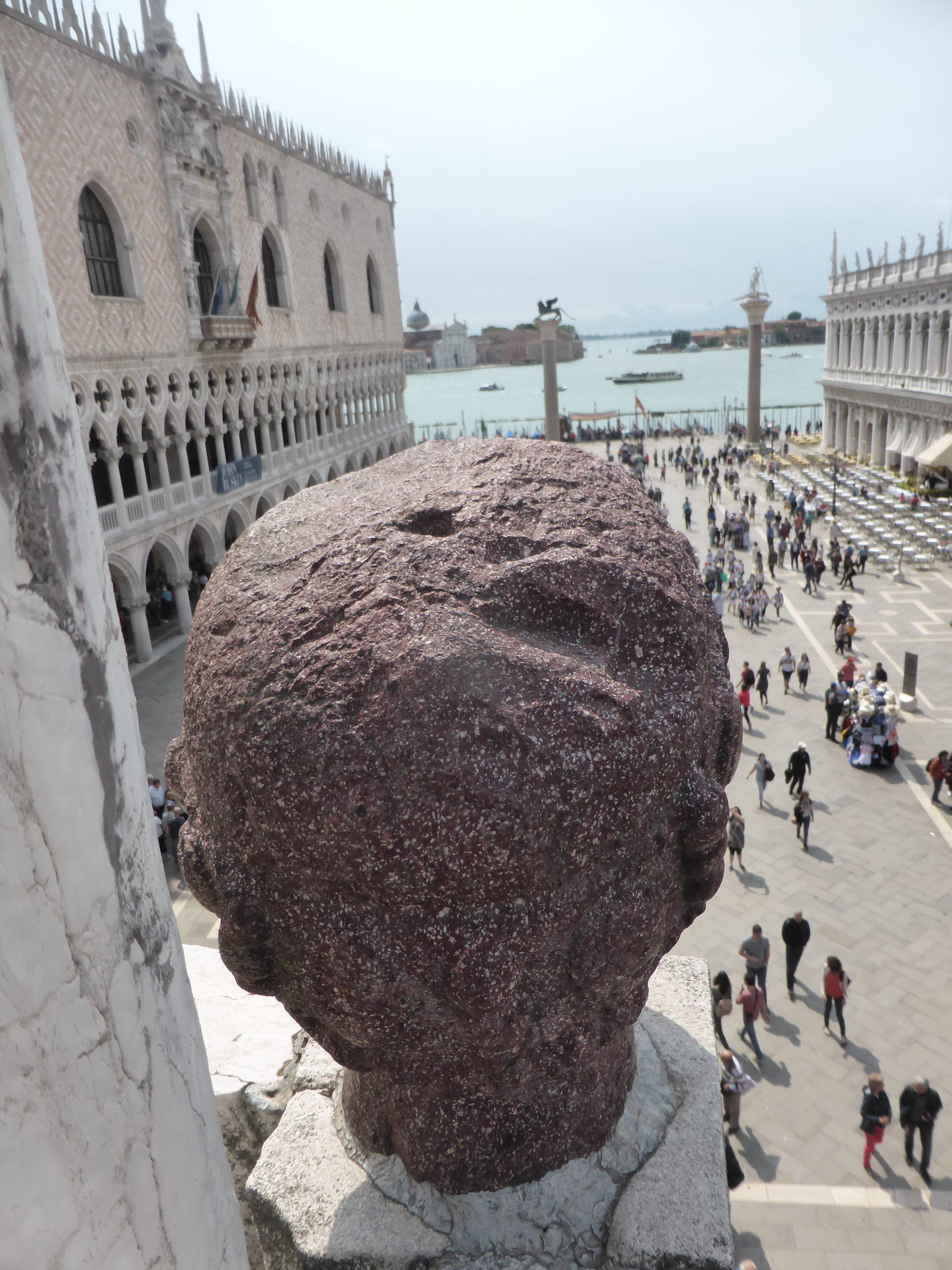 Carmagnolas Hinterkopf